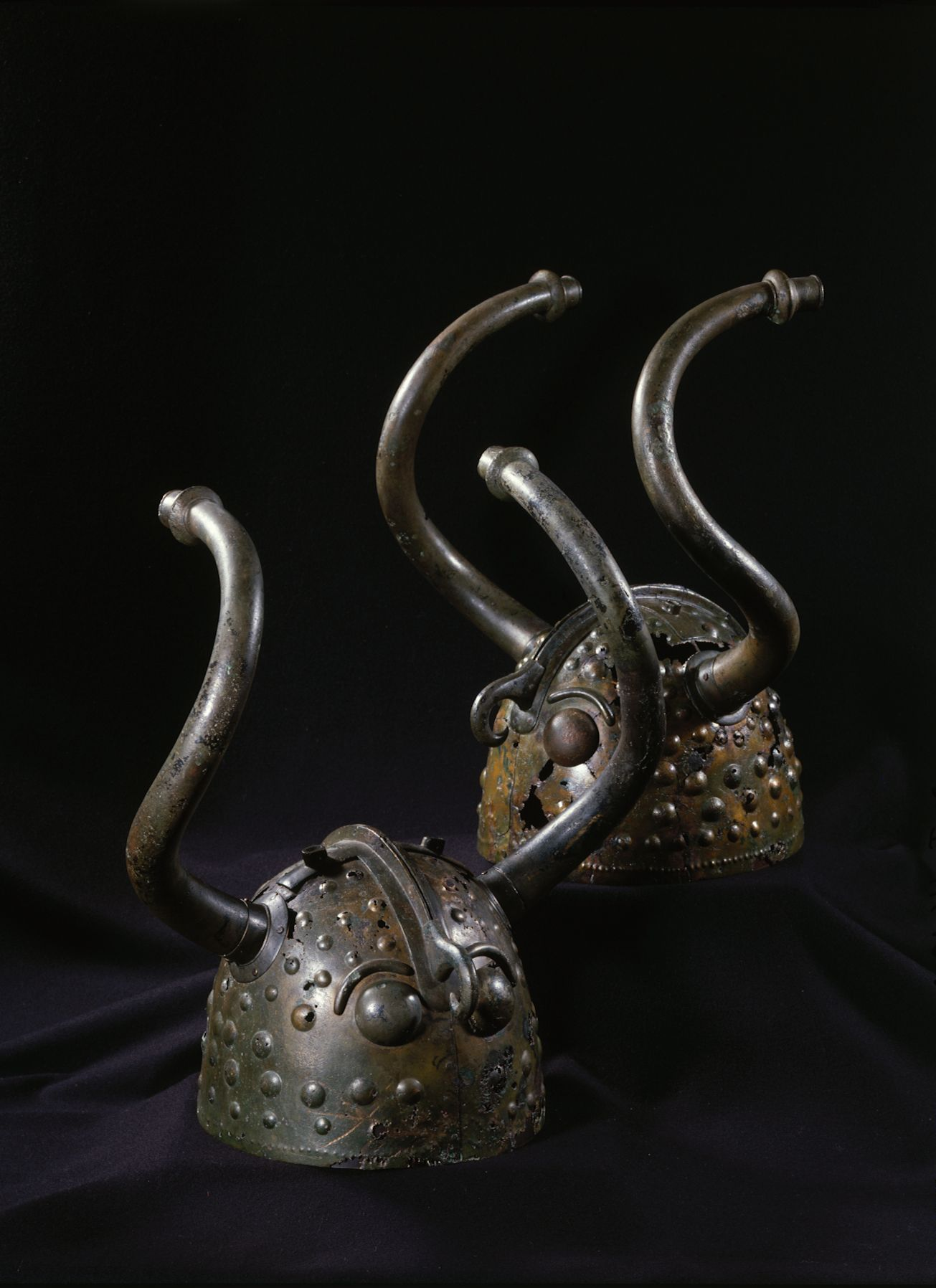 Tv.: Hjelm fra Brøns mose, Veksø sogn (B13552) Th.: Hjelm fra Brøns mose, Veksø sogn (B13553)